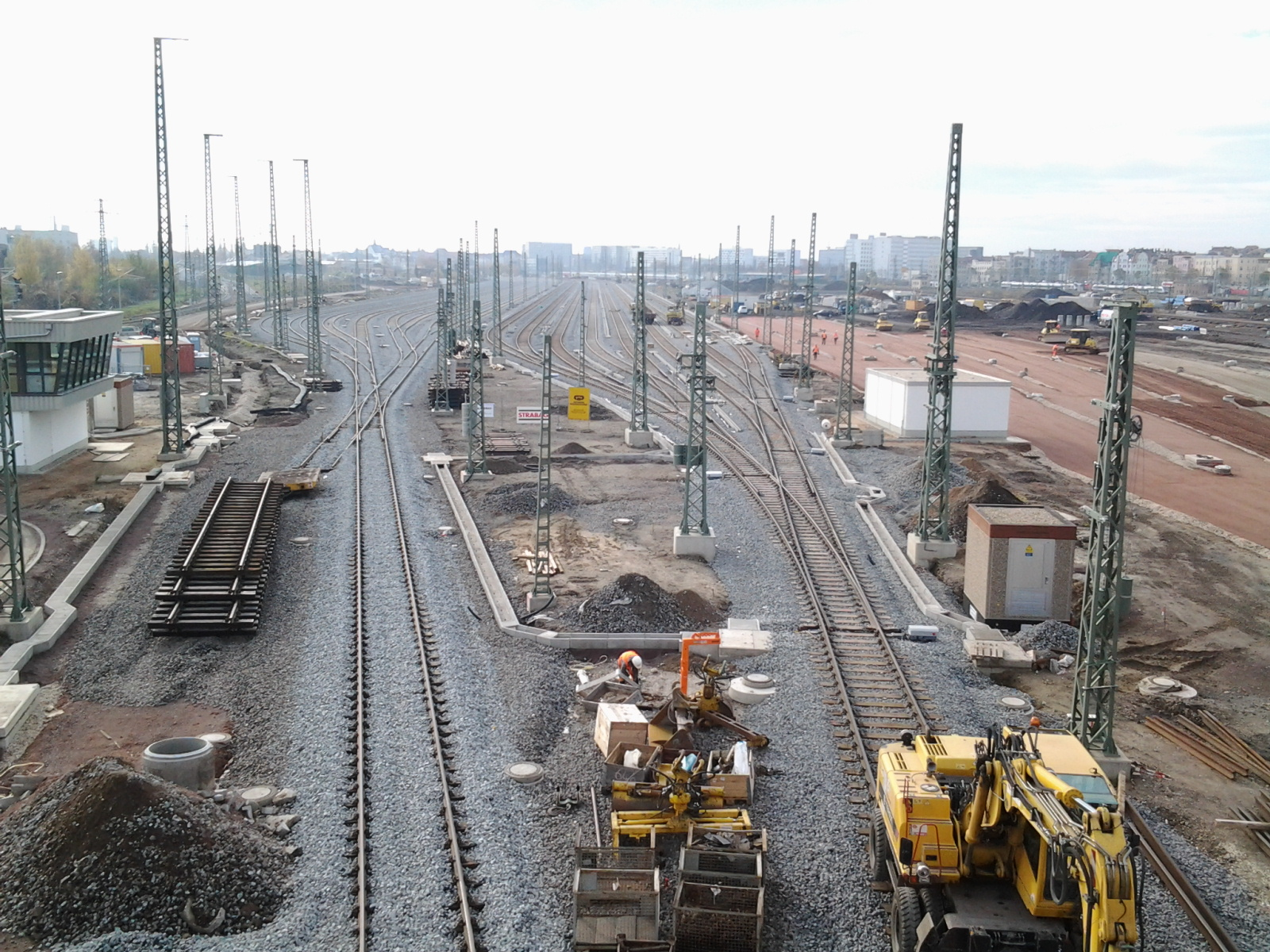 Halle Saale Güterbahnhof während der Umbauarbeiten im Jahr 2015, Blick von der Berliner Brücke in Richtung Süd.